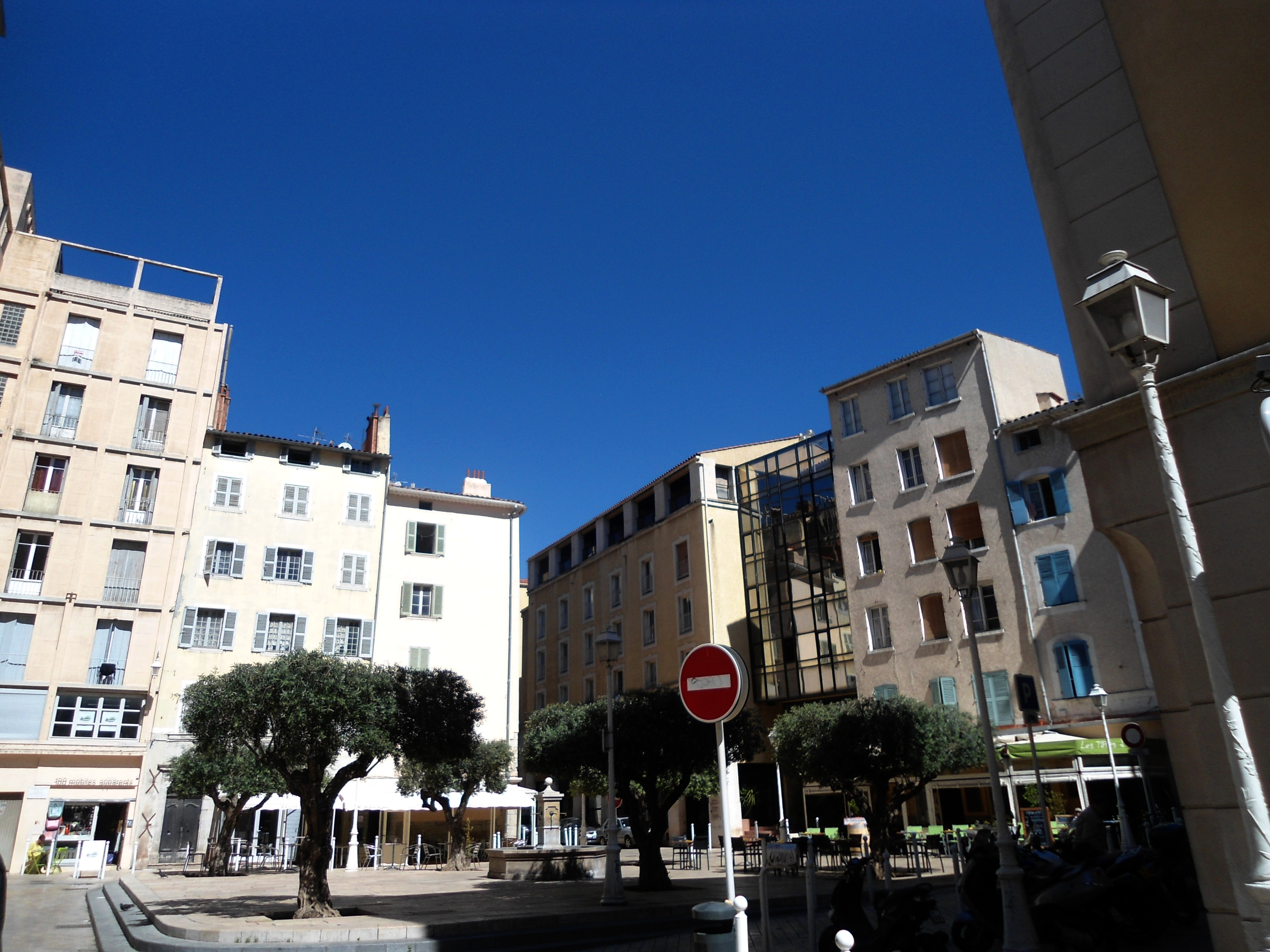 plaça d'oli, Tolon